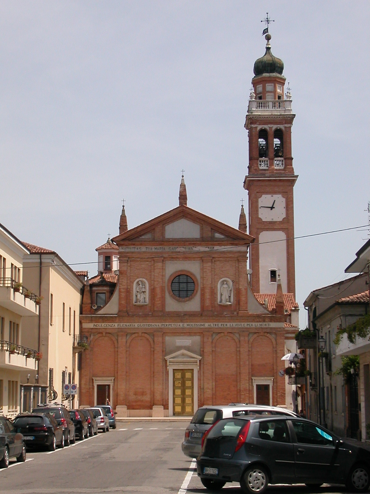 Santuario della beata vergine del Pilastrello, Lendinara.